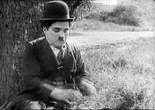 fotografía de la película The Tramp de Charles Chaplin